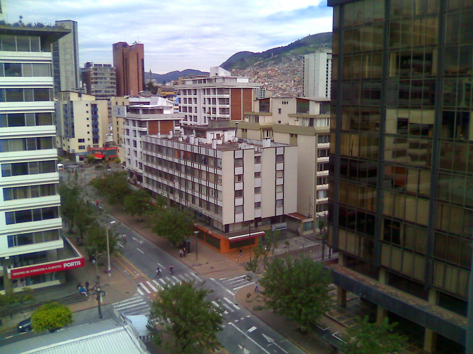 Norte de Quito Av.Amazonas y Roca Centro Norte de Quito